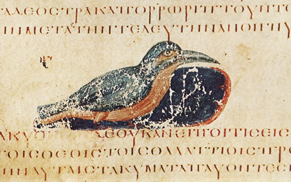 Miniatur eines Eisvogels (Alcedo ispida now Alcedo atthis ispida) im spätantiken Wiener-Dioskurides-Kodex (Paraphrase der „Ornithiaka“ des Dionysios) fol. 479 verso